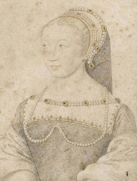 Anne de Pisselieu